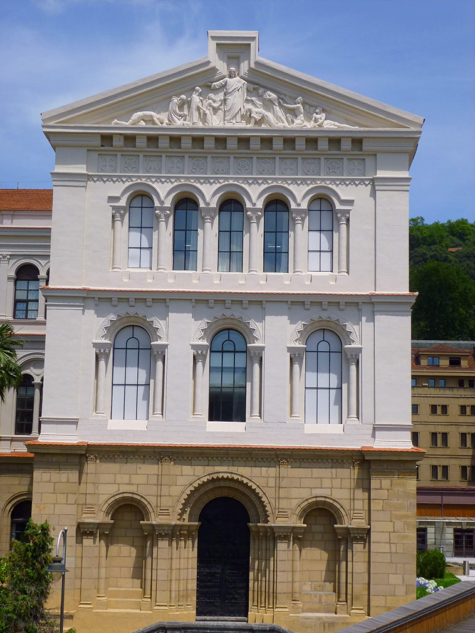 Universidad de Deusto (Bilbao)